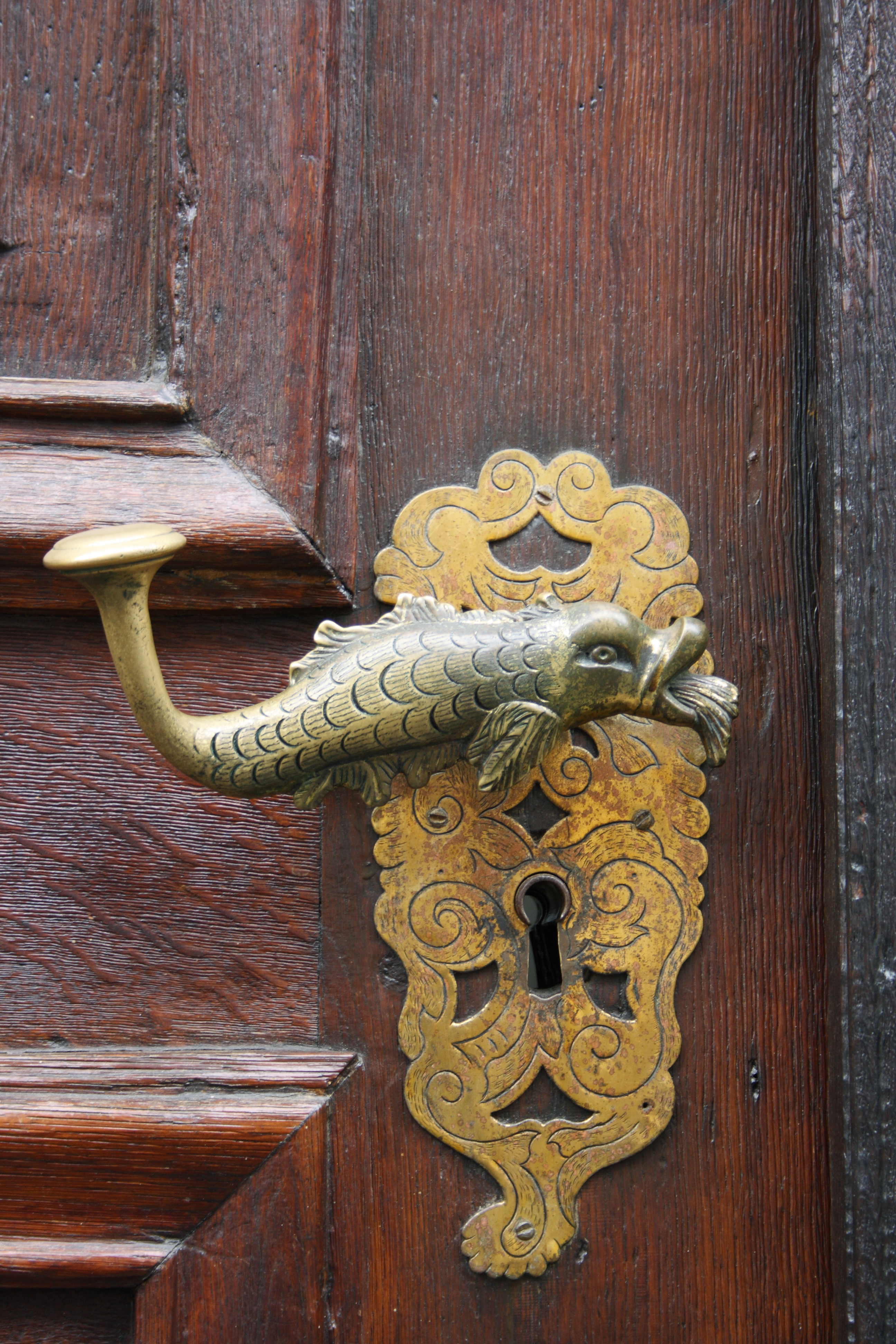 Evangelische Stadtkirche in Lauterbach (Hessen) am Marktplatz 10, Türgriff von Johann Thomas Schmidt